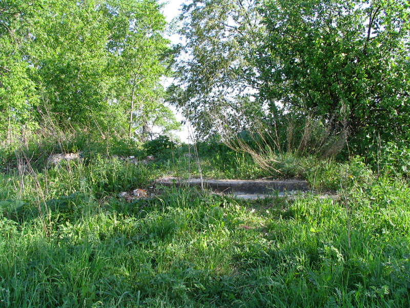 Остатки Успенского собора на городище Старая Рязань